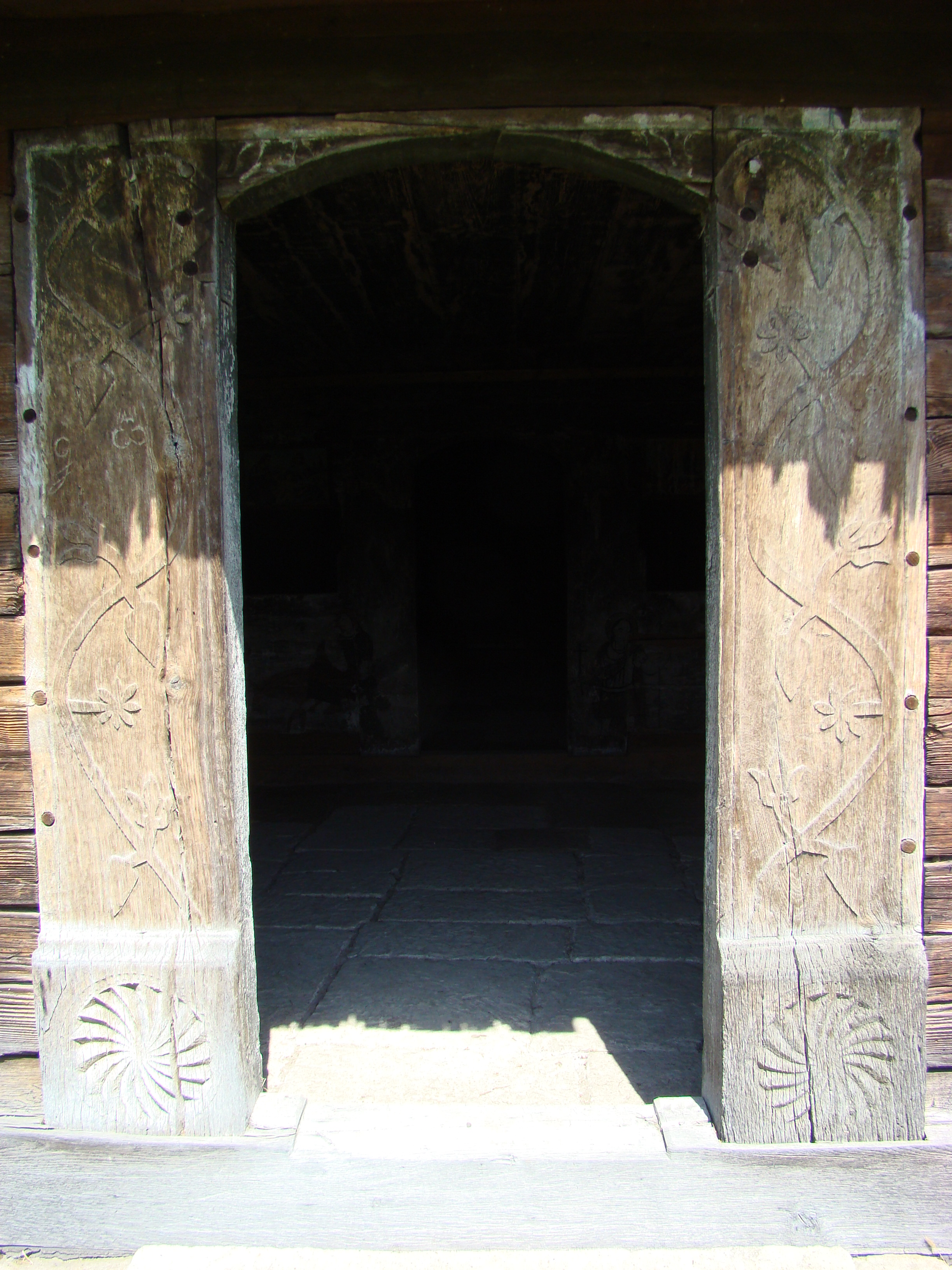 Biserica de lemn din Apahida, județul Cluj